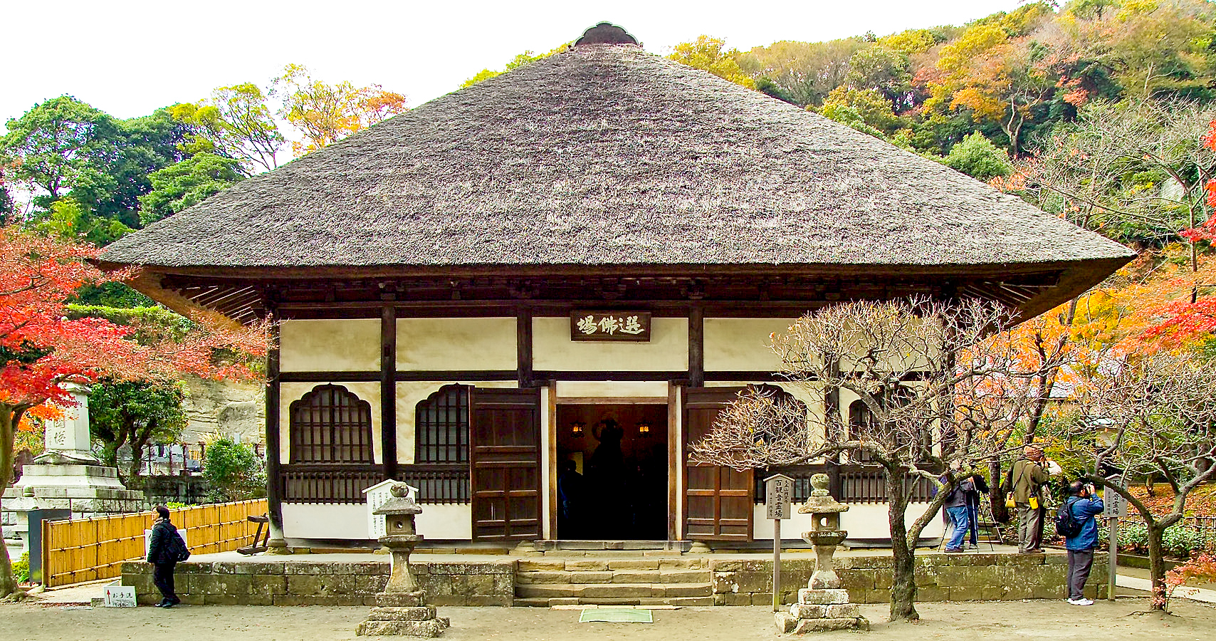 Senbutsujō, a building at Engaku-ji in Kamakura, Japan 鎌倉円覚寺の選仏場